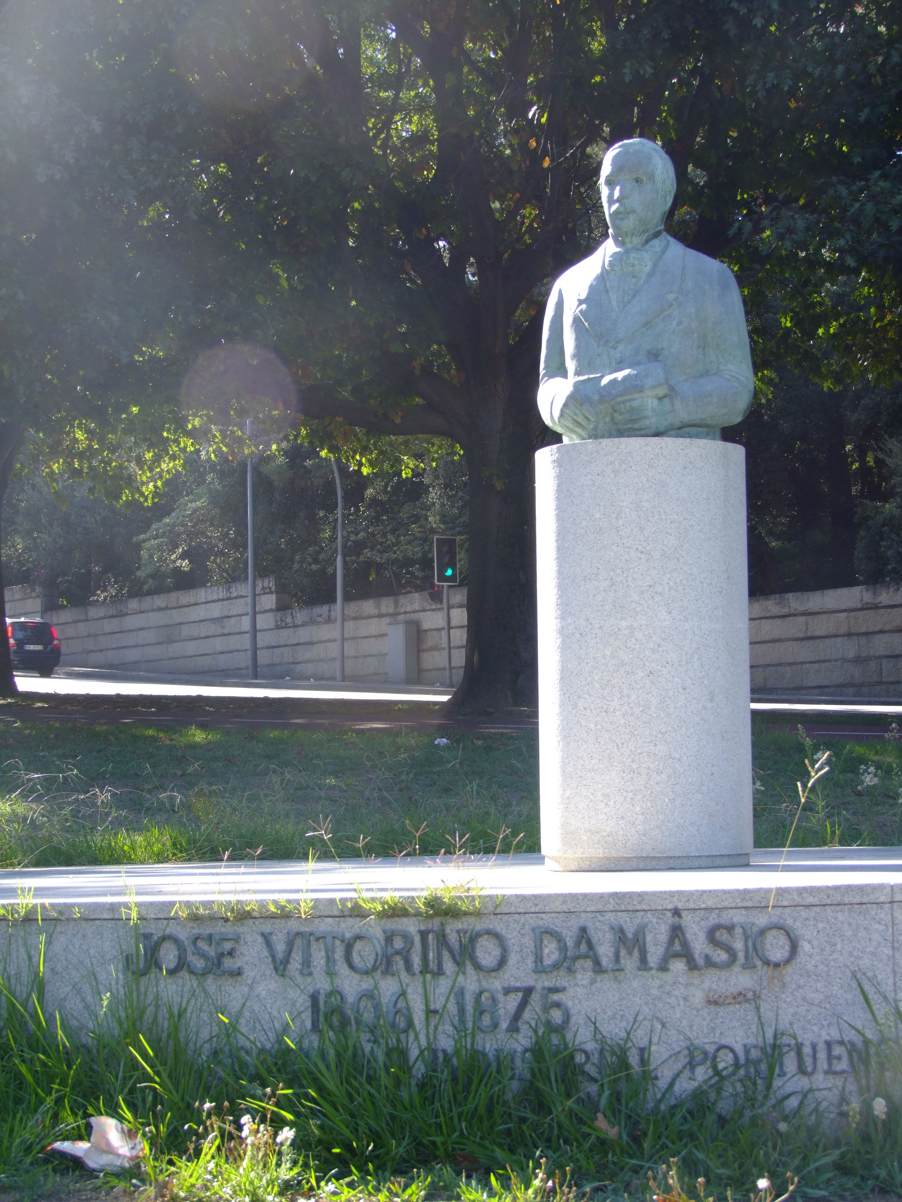 José Vitorino Damásio, busto em Lordelo do Ouro, Pasteleira, Rua de Aleixo Mota. De 1998. autor Gustavo Bastos.